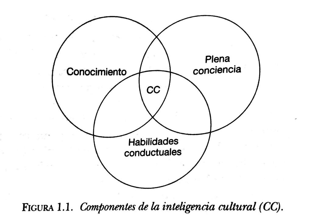 Són els components bàsics per desenvolupar la intel·ligència cultural, entre ells estan relacionats.